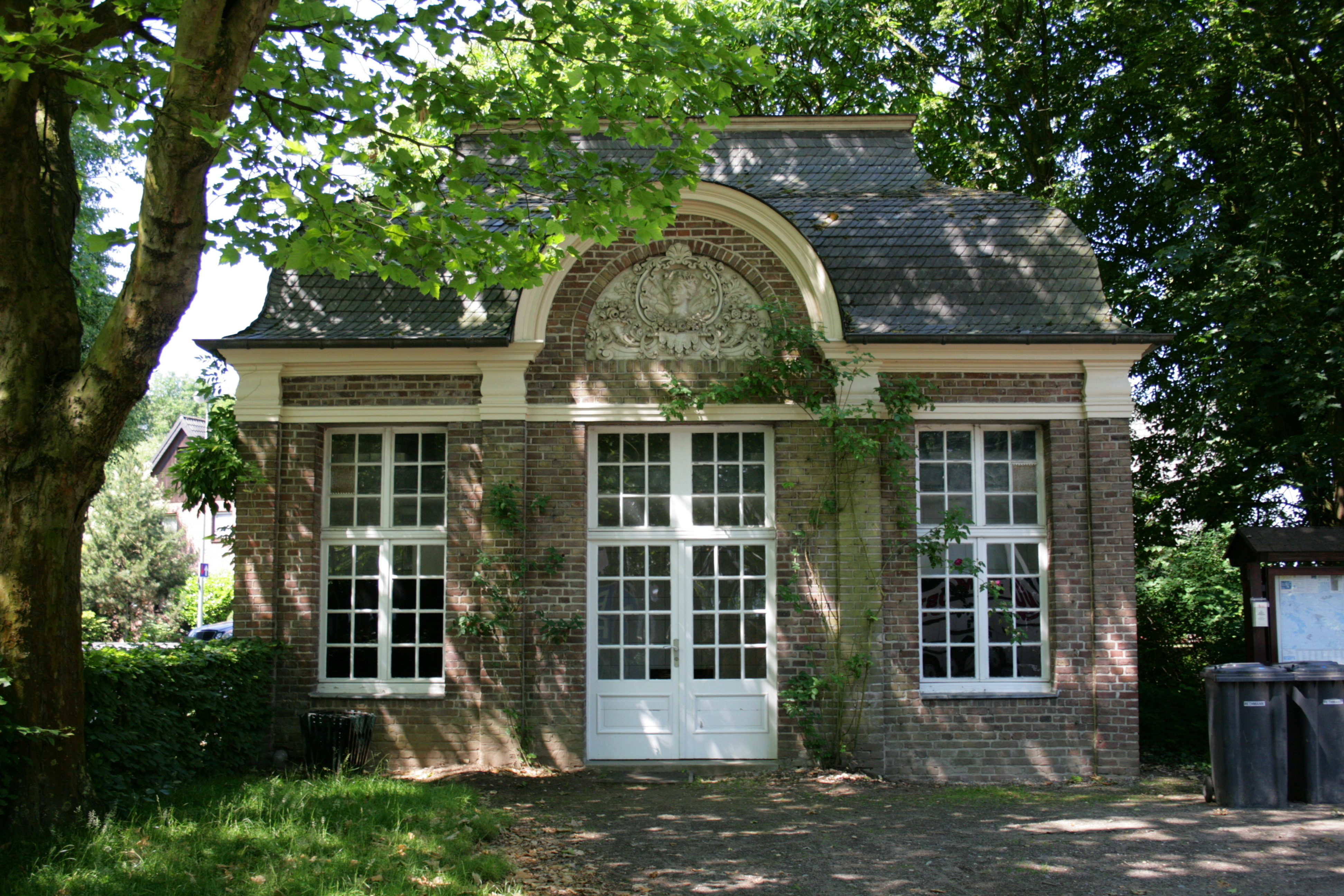 Orangerie der Wasserburg Anholt in Anholt, Isselburg